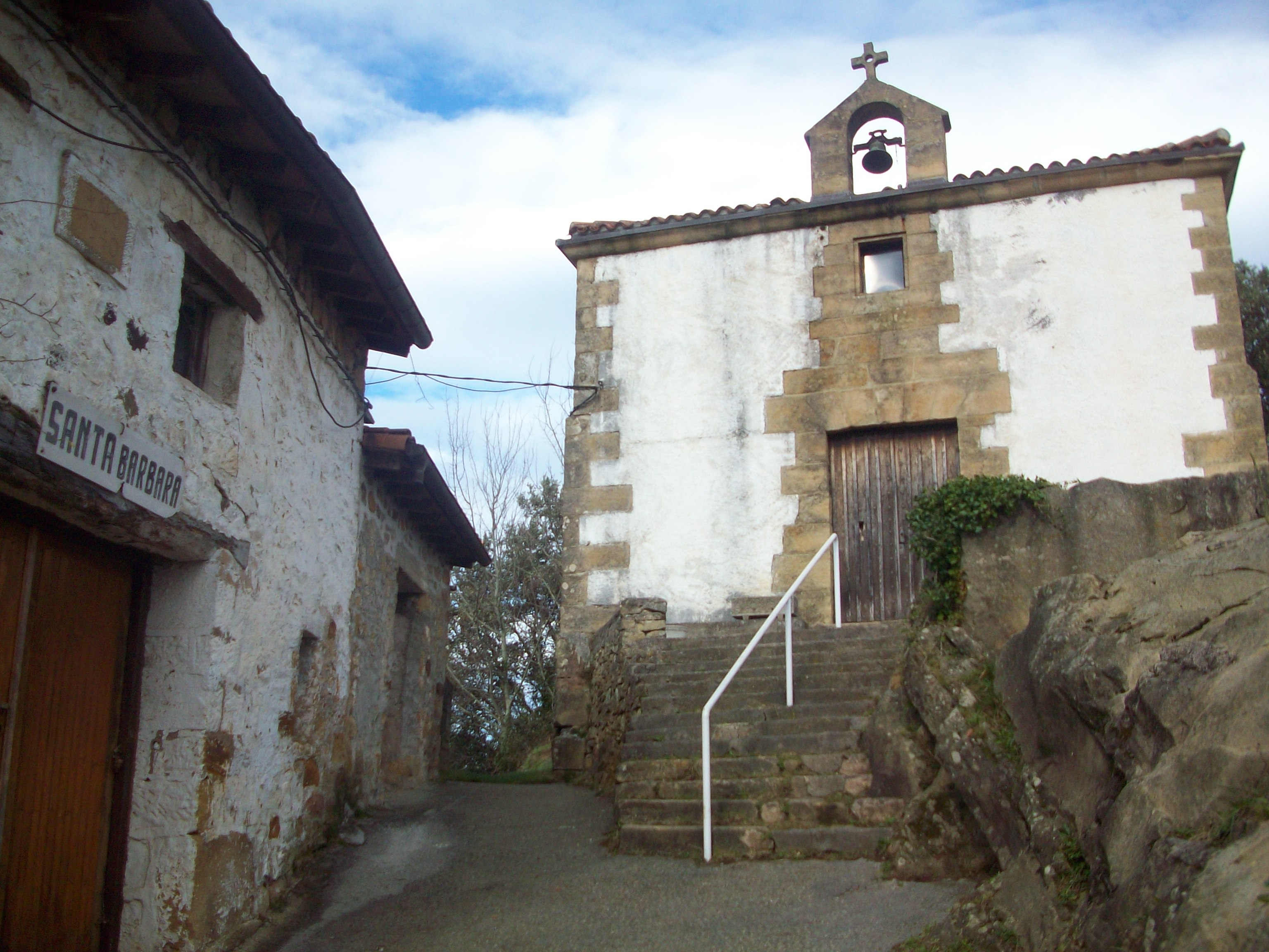 Zarauzko Santa Barbara baseliza. Gipuzkoa, Euskal Herria.